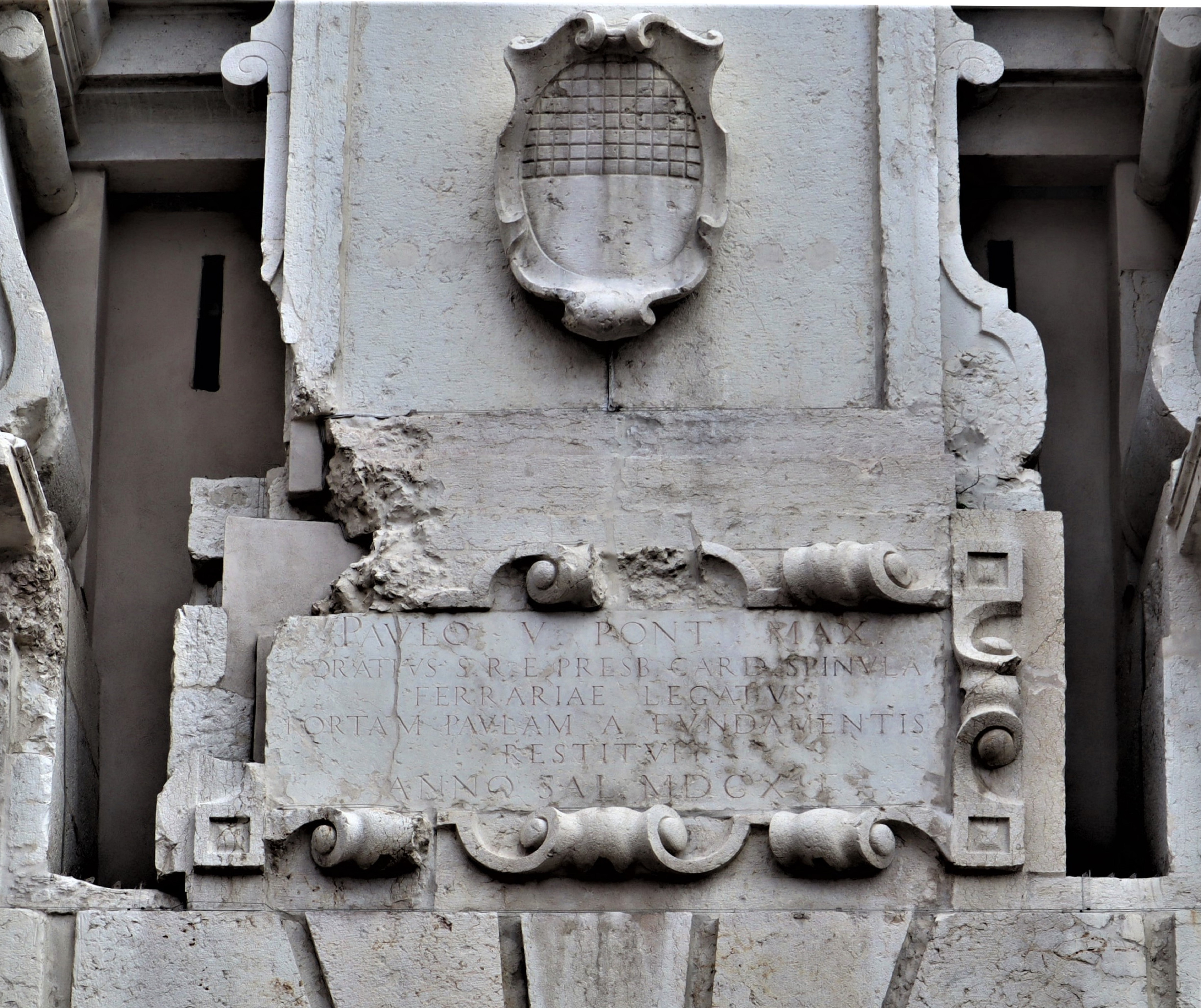 Porta Paola a Ferrara. Prospetto verso via Bologna. Particolare stemma ed epigrafe.